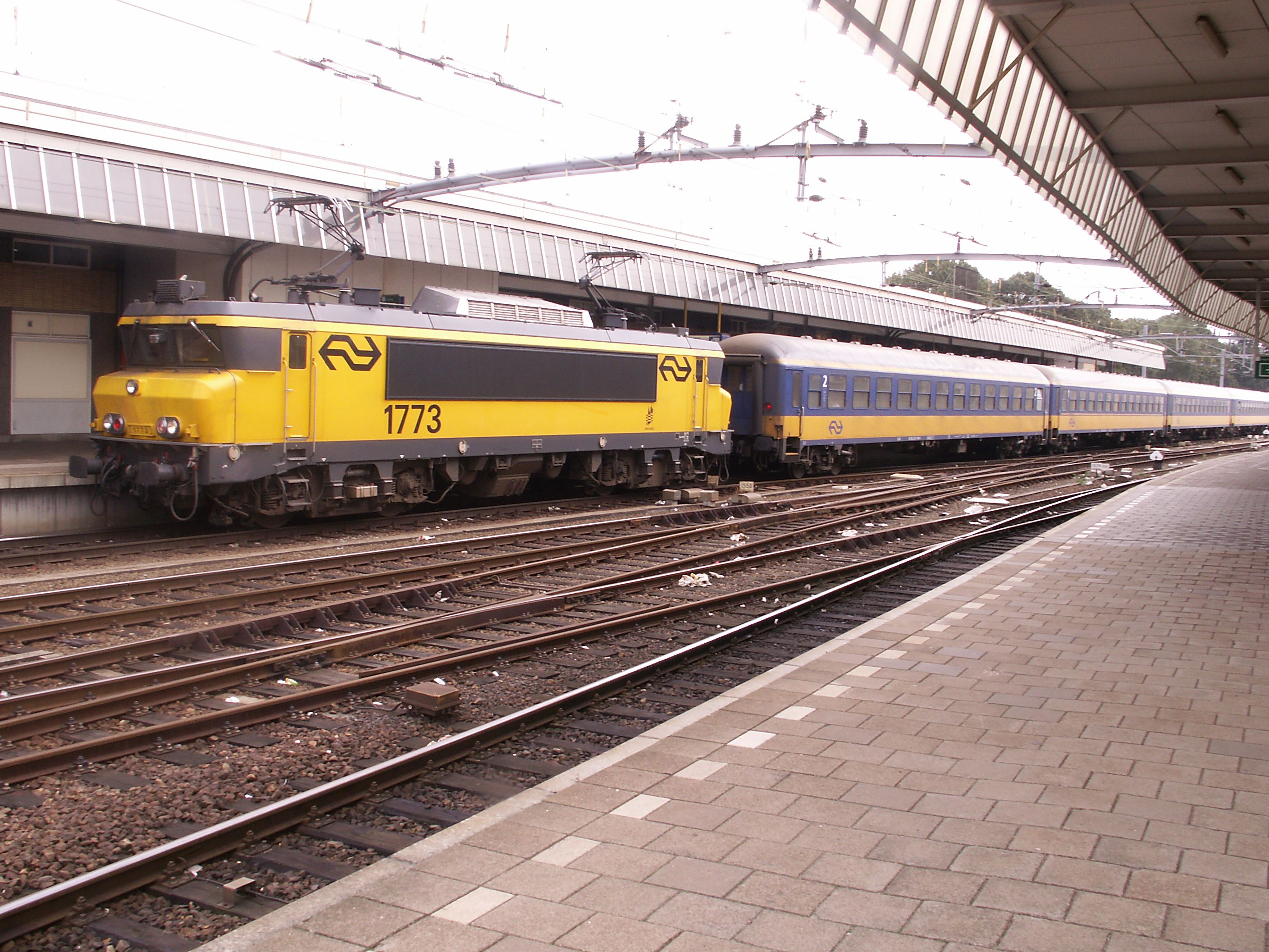 Bf Venlo